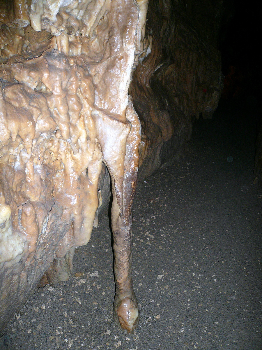 Charlottenhöhle